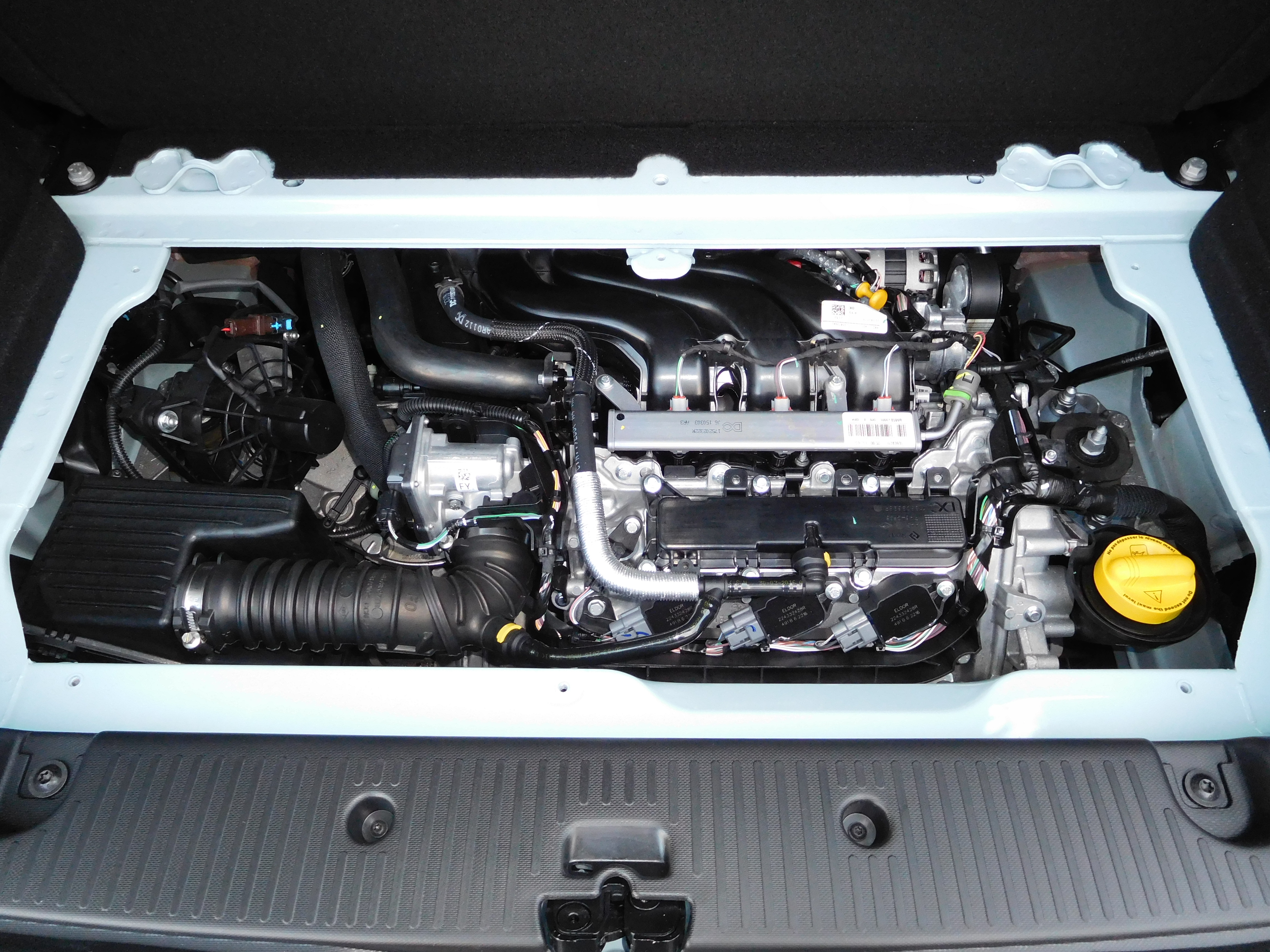 Renault Twingo III Life SCe 70 BC coloris Bleu dragée de 2016 : moteur (en position arrière) 3-cylindres en ligne atmosphérique de 999 cm3 développant 70 ch. Distribution par chaîne sans entretien. Consommation mixte : 5,0 L/100 km.